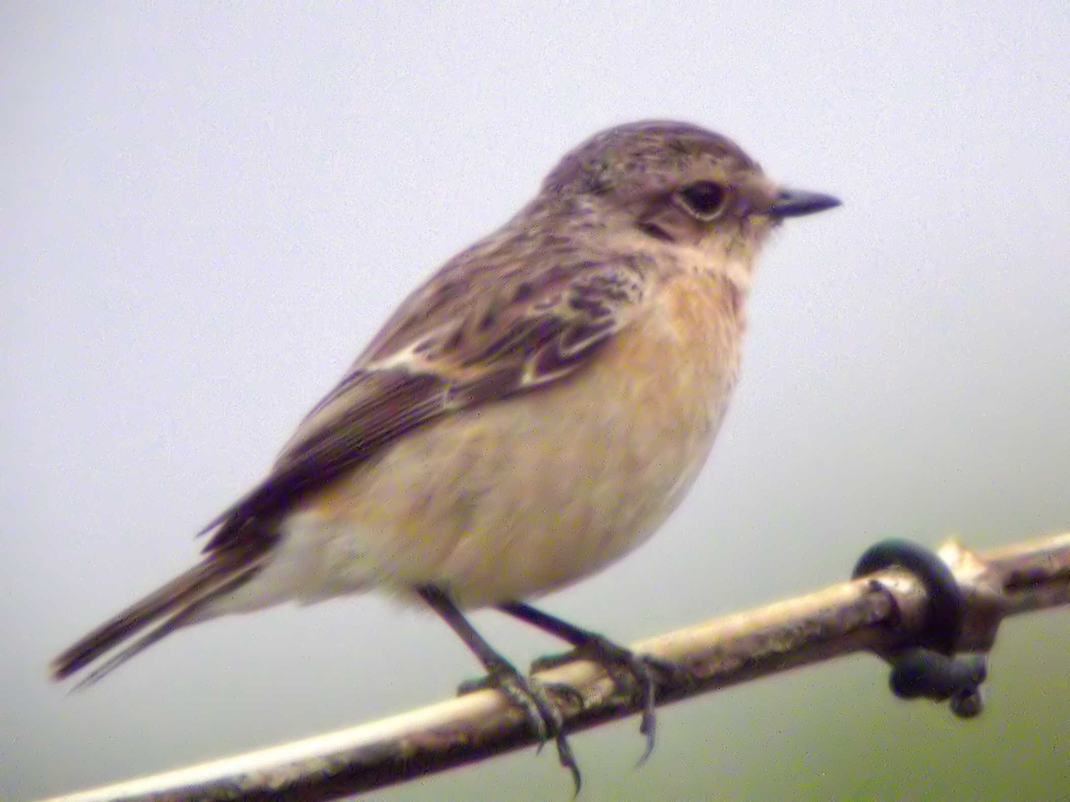 Stejneger's Stonechat, at farmlands, Hong Kong.